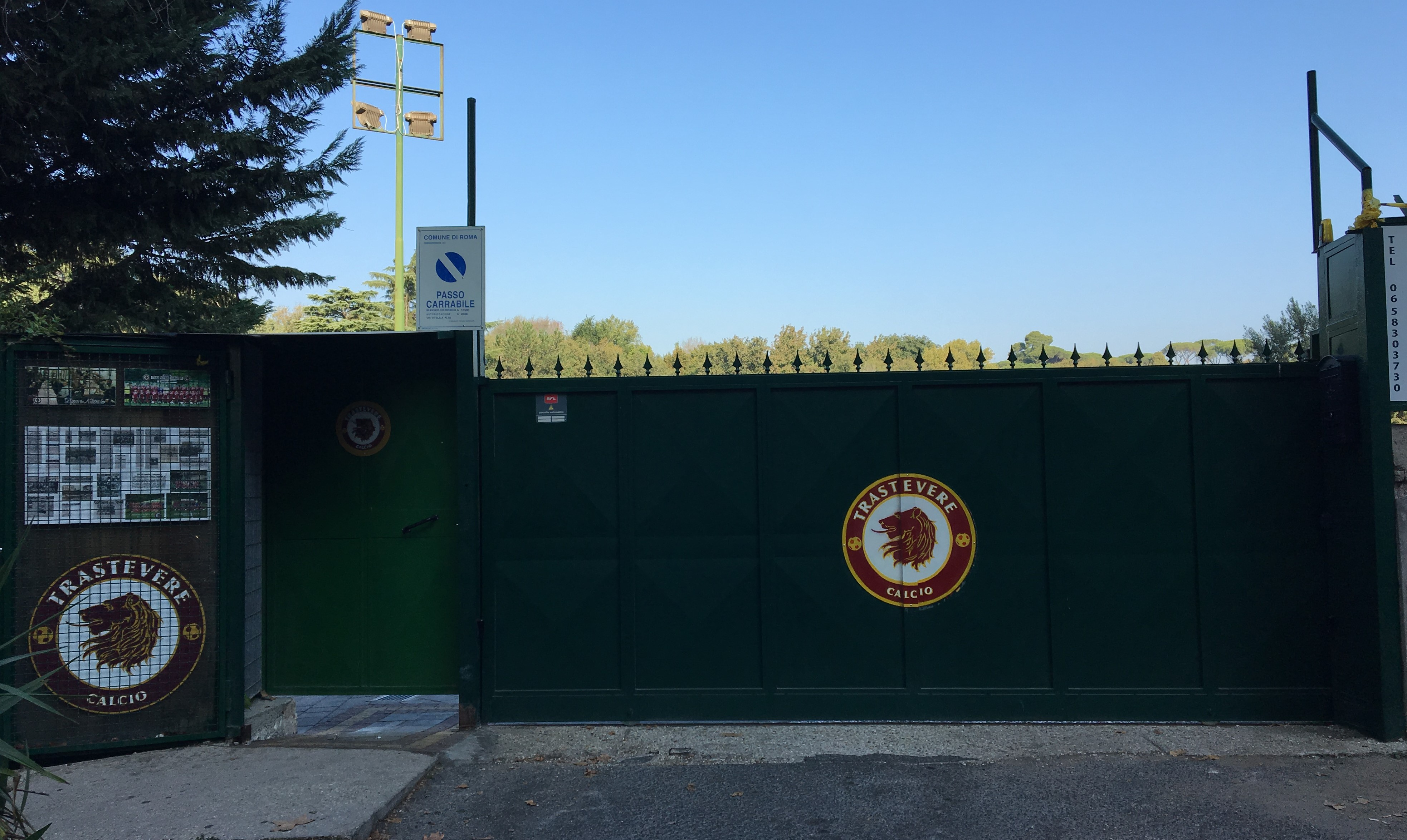 L'ingresso del Trastevere Stadium